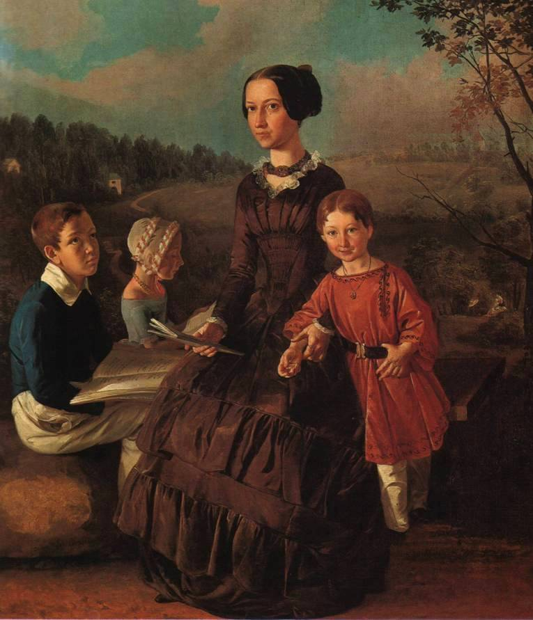 Иван Фомич Хруцкий. 1810— 1885 Семейный портрет 1854 И.Ф. Хруцкий — портретист, пейзажист, мастер натюрморта. Родился в местечке Уле Лепельского уезда Витебской губернии в семье священника. Около 1827 года приехал в Петербург, учился в Академии художеств у А.Г. Варнека. Получил звание свободного художника , ,во внимание к хорошим сведениям в ландшафтной живописи" (1836), академика (1839)- Вслед за этим переселился в Вильно, работая преимущественно над картинами религиозного содержания и портретами. С 1850 года жил в своем имении Захаревичи близ Полоцка. Картина воспроизводит ландшафт западных губерний России. В композиции семейного портрета чувствуется знание художником традиций старой европейской и польской живописи (расположение фигур в виде классического „треугольника", профильный поворот, редко встречающийся в русском искусстве). Группа вынесена на передний план, но не оторвана от пейзажа, с которым ее связывает общее лирическое чувство.